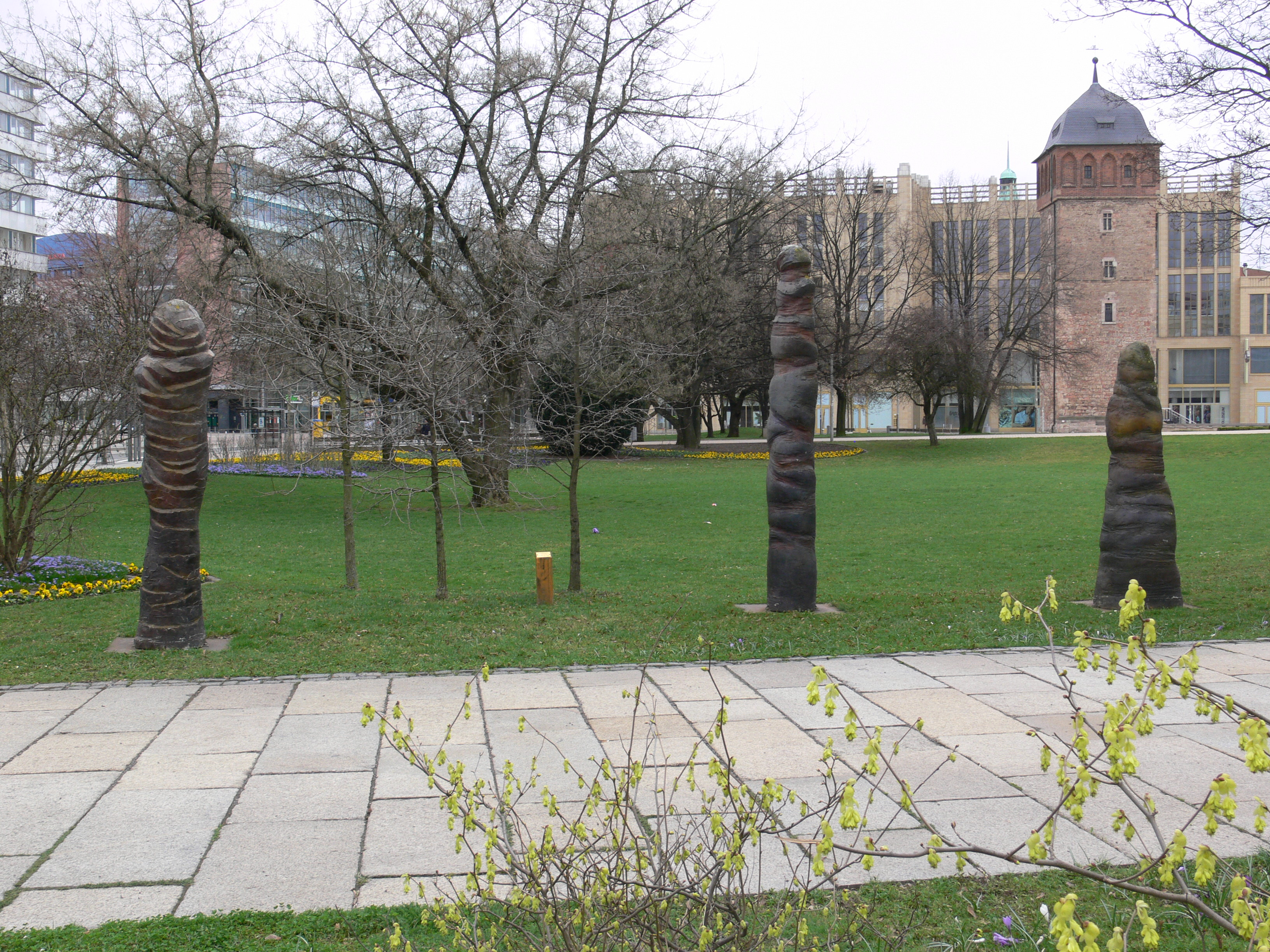 Chemnitz; Stadthallenpark Rainer-Maria Schubert: '3 Skulpturen-Verwicklungen, dreiteilige Skulptur, 2001, Stahlgerüst, mit Faserbeton überzogen (entstanden im Rahmen des Kunstprojektes InSicht)